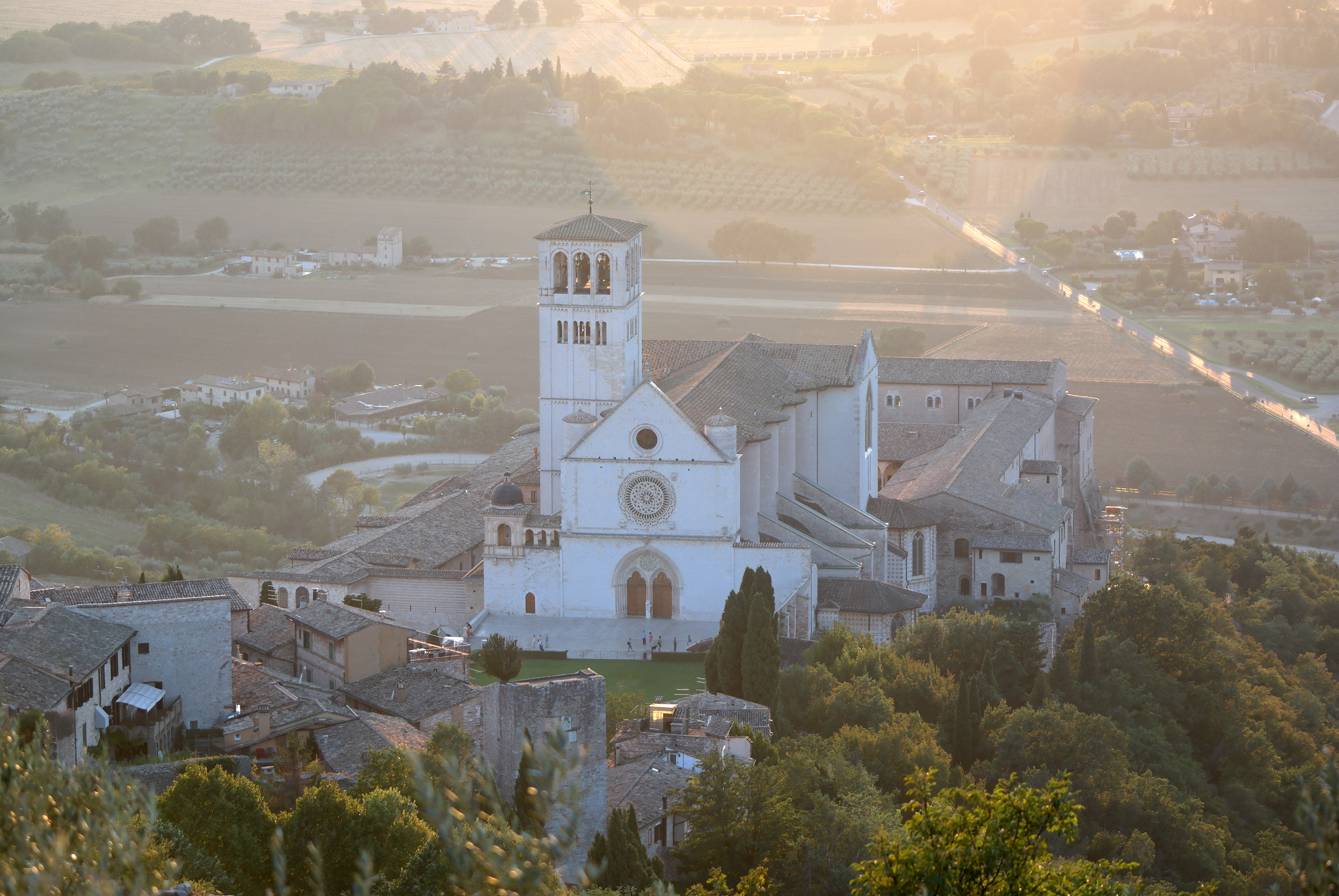 Basilica di San Francesco d'Assisi vista dalla Rocca maggiore